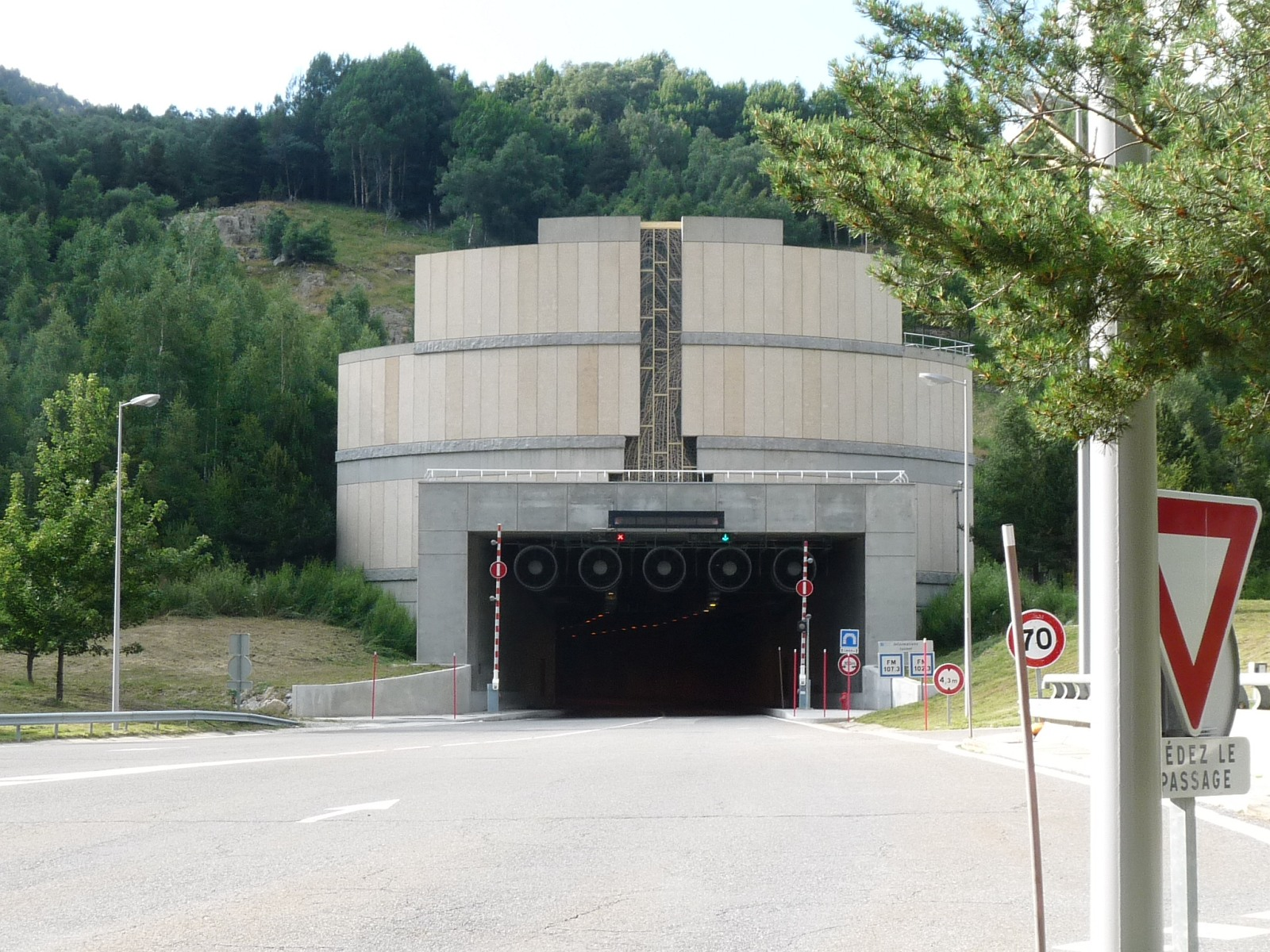 Entrée sud du tunnel routier de Puymorens, Pyrénées-Orientales, France